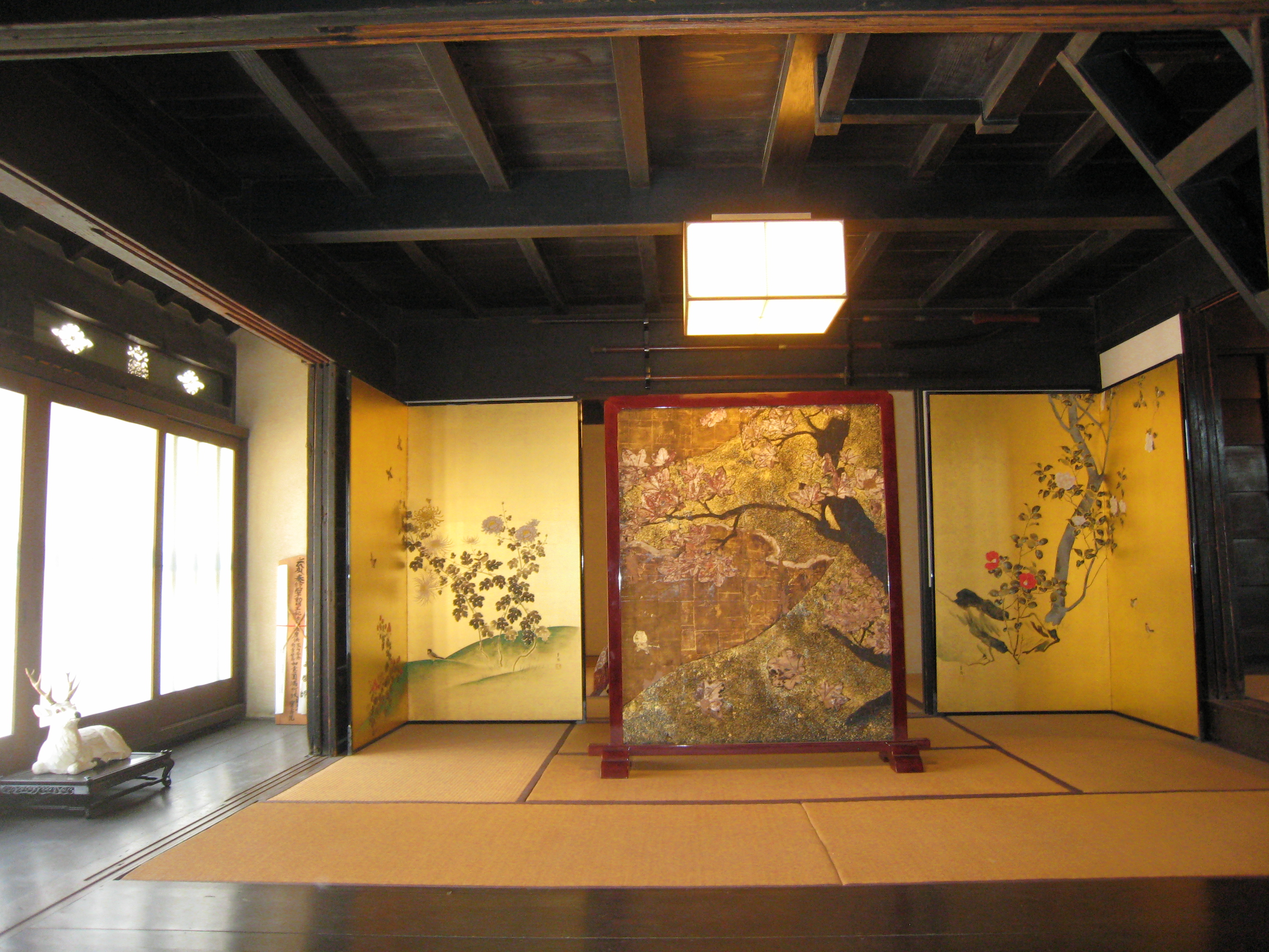 奈良県橿原市今井町、重要文化財今西家住宅見世。